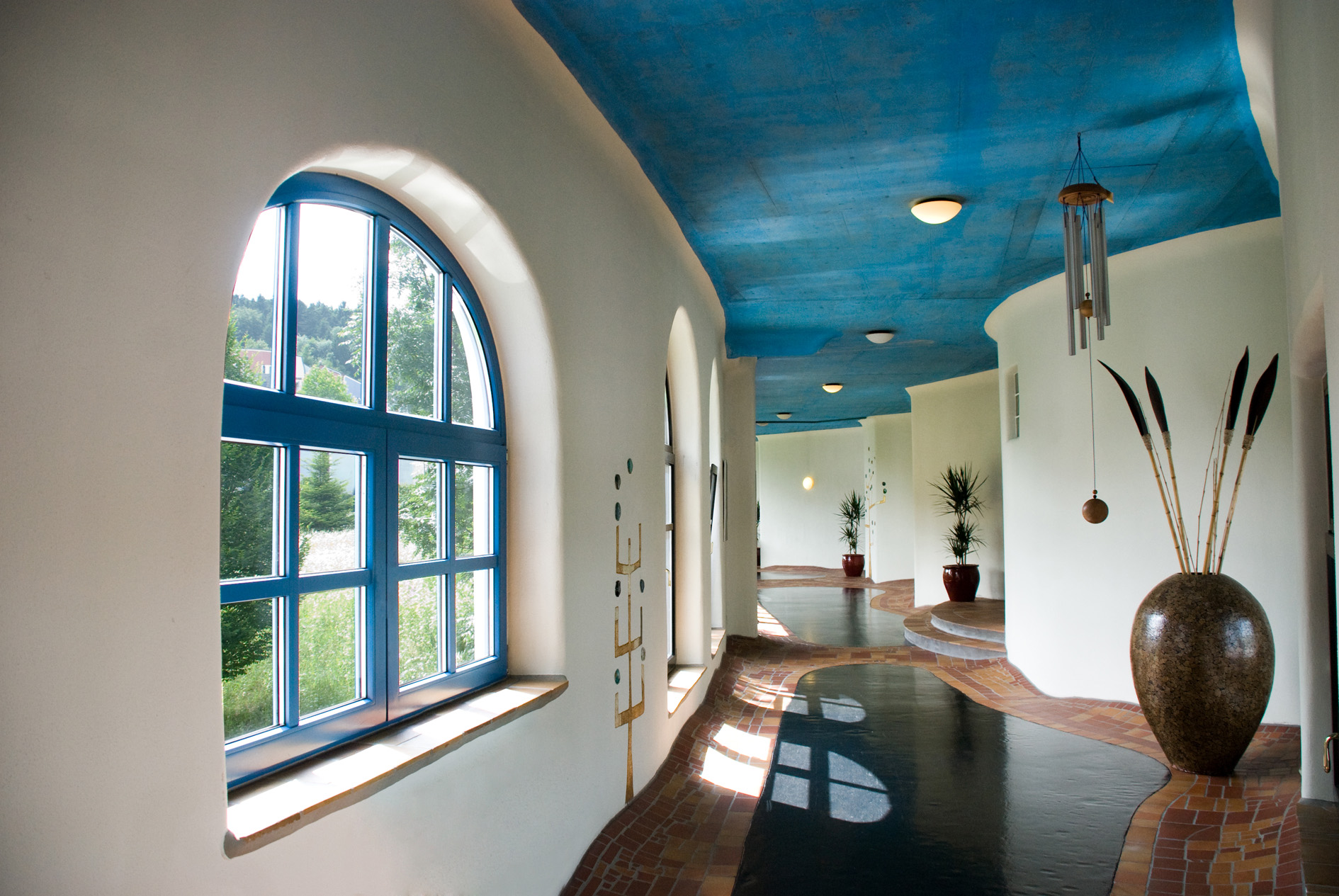 Hotel Therme Rogner Bad Blumau, Österreich: Das Gangsystem verbindet alle Zimmer und Suiten, der von Friedensreich Hundertwasser geplanten Anlage, mit dem Restaurant- und Wellnessbereich